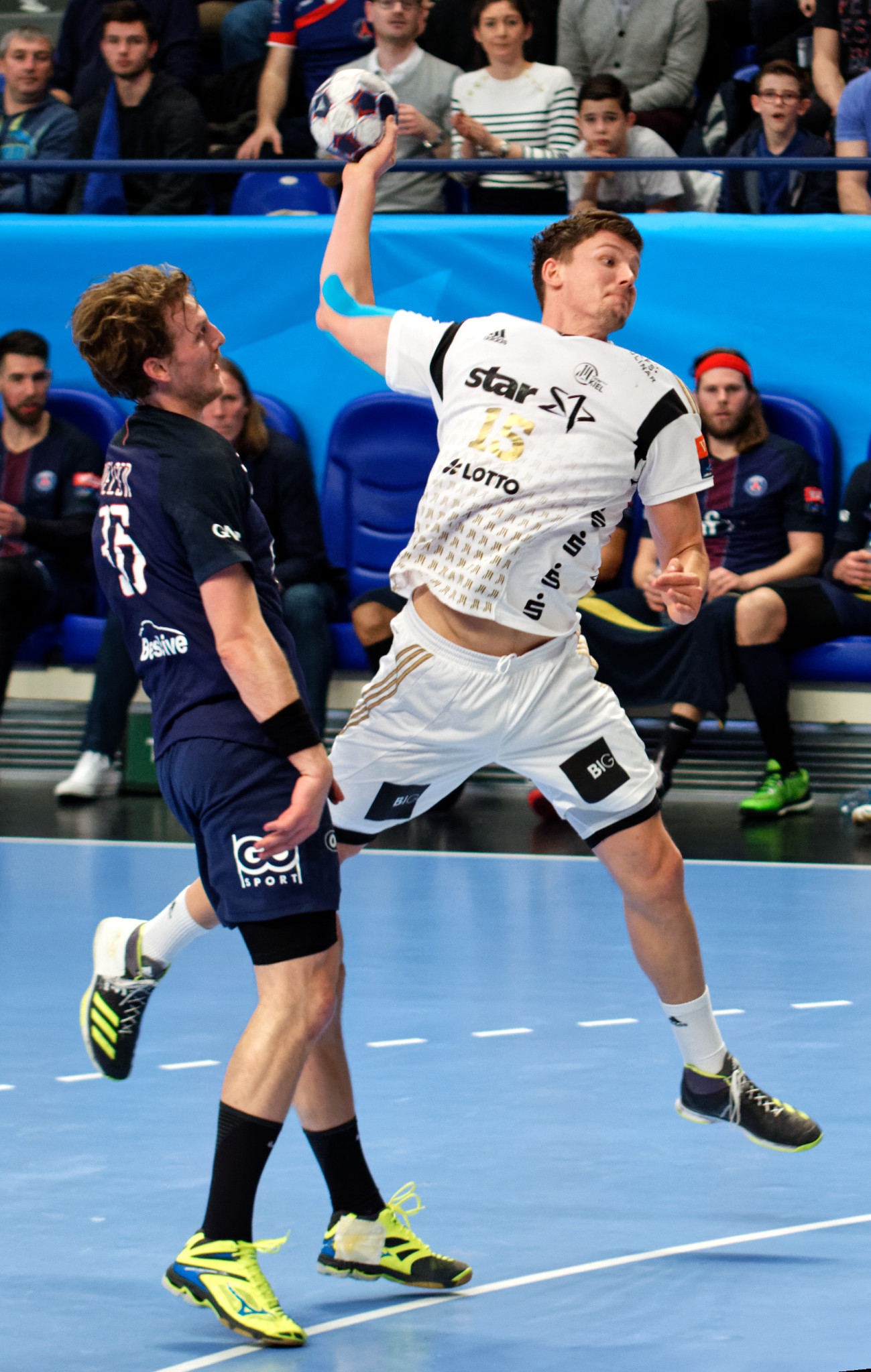 Rencontre de phase de groupe de la ligue des champions 2016-17 entre le PSG et le THW Kiel. A Coubertin, le 12 mars 2017.